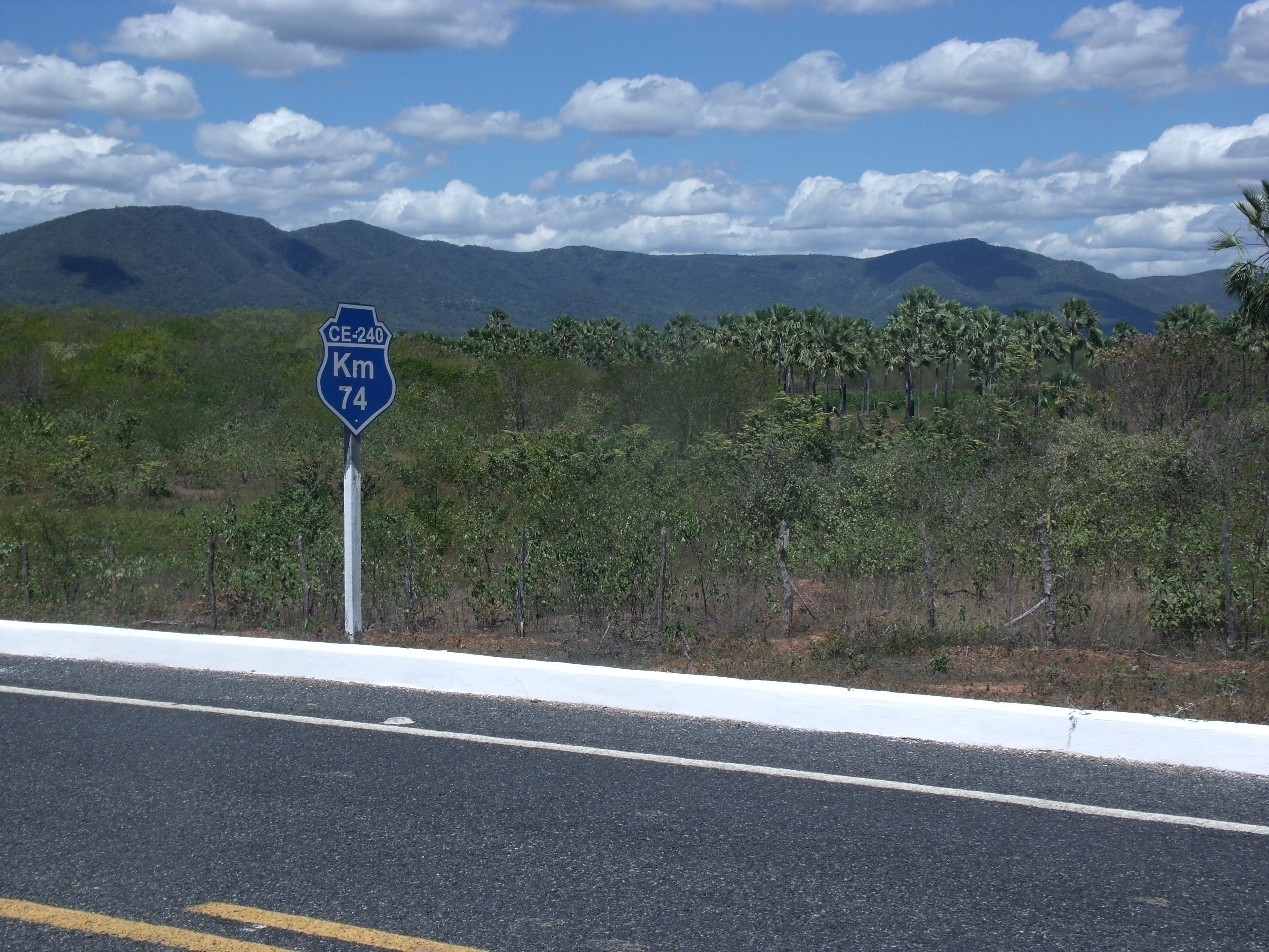 Vista da Serra da Penanduba a partir da CE 240, sentido Araquém-Coreaú.